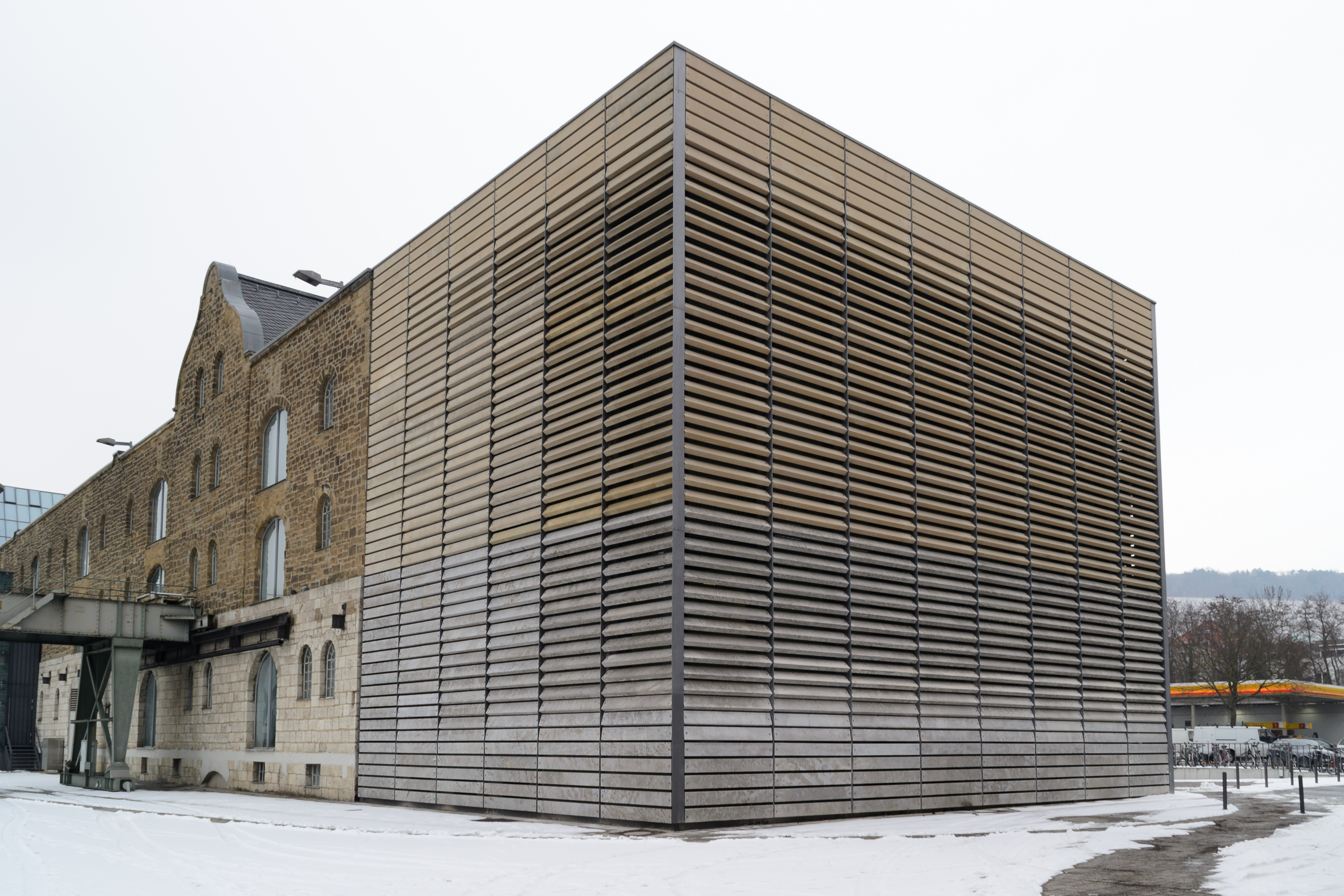 Erweiterungsbau an der Südseite des Kulturspeichers in Würzburg.